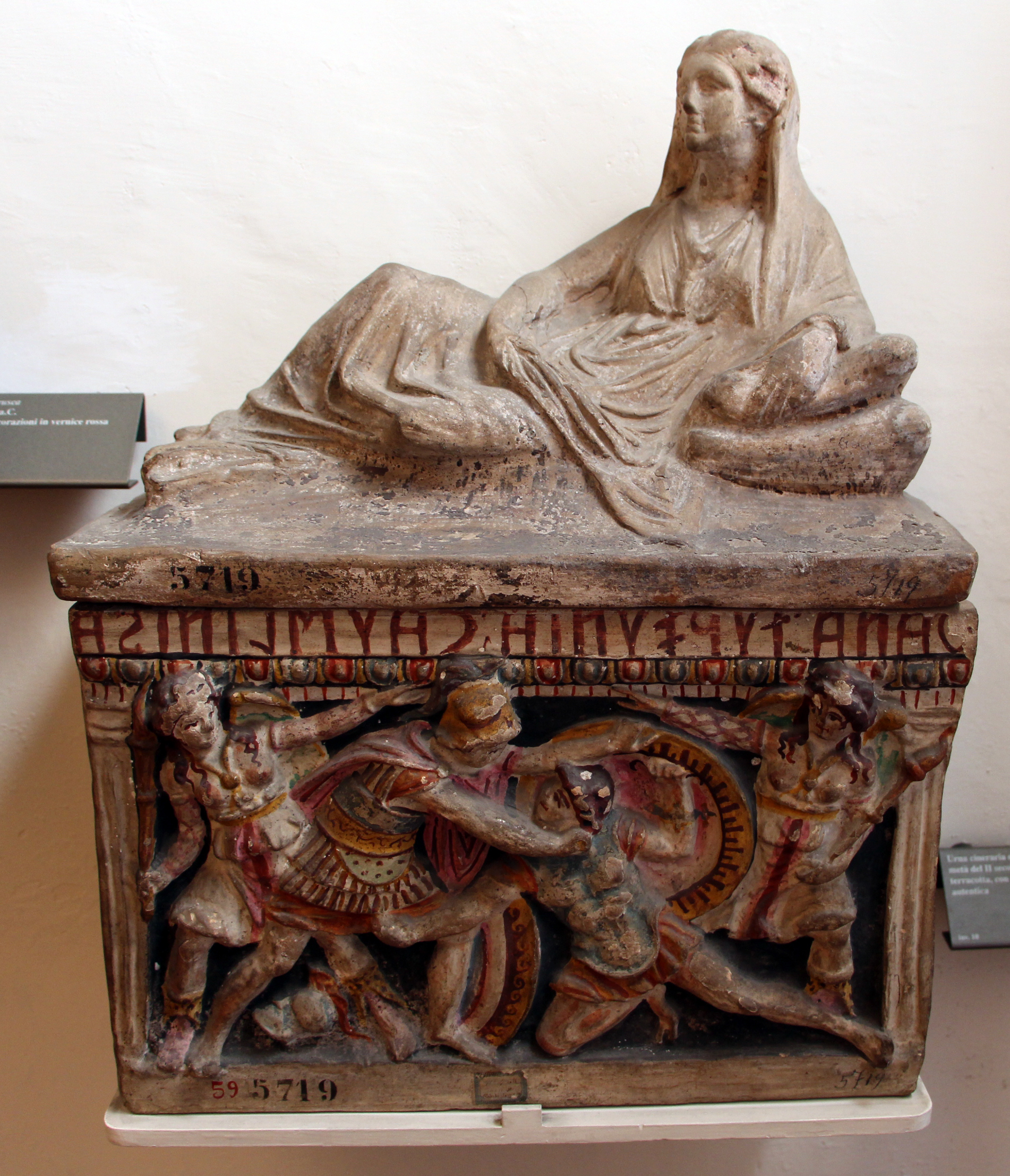 Casa Buonarroti, Firenze